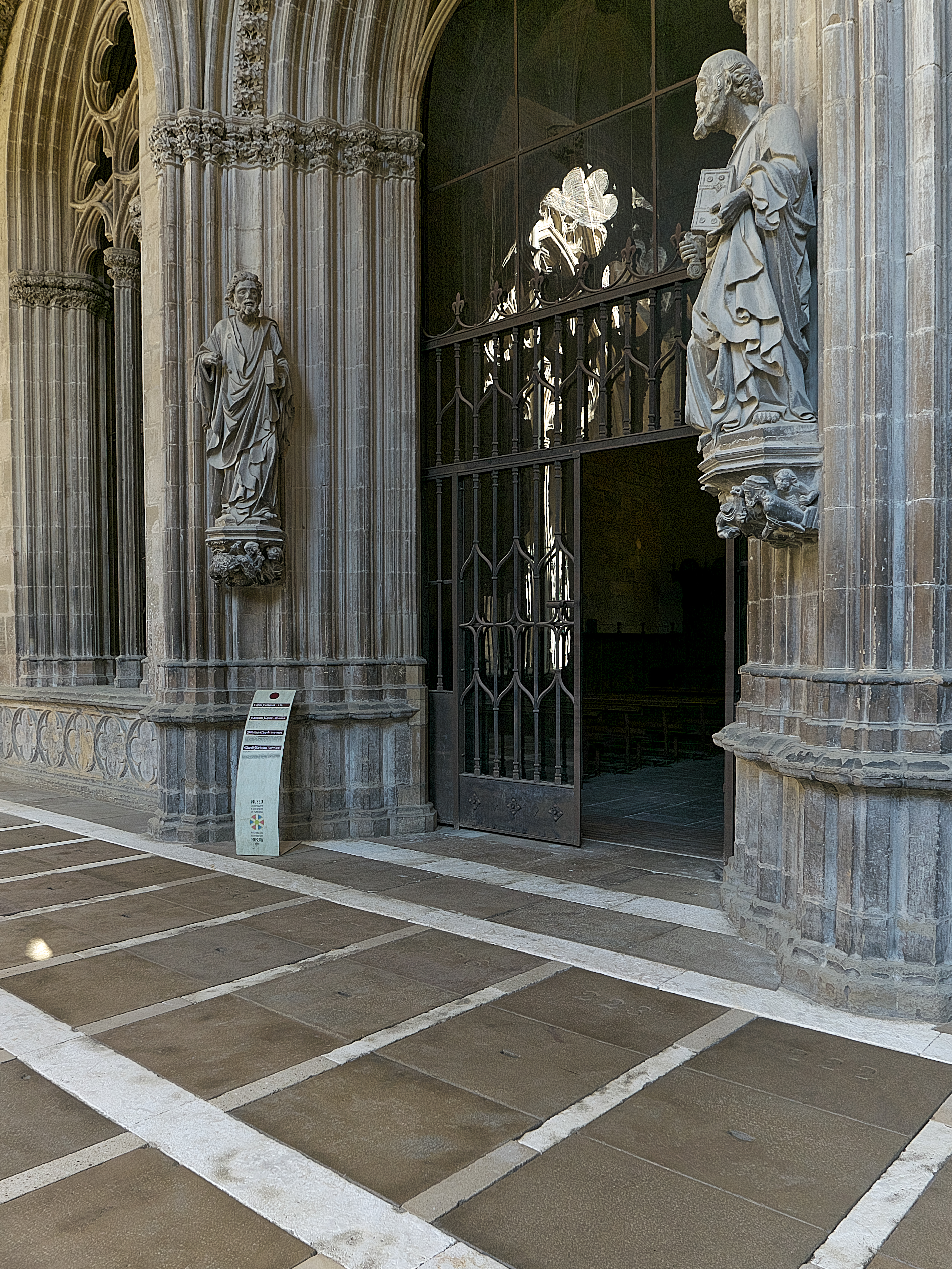 Entrada de la capilla